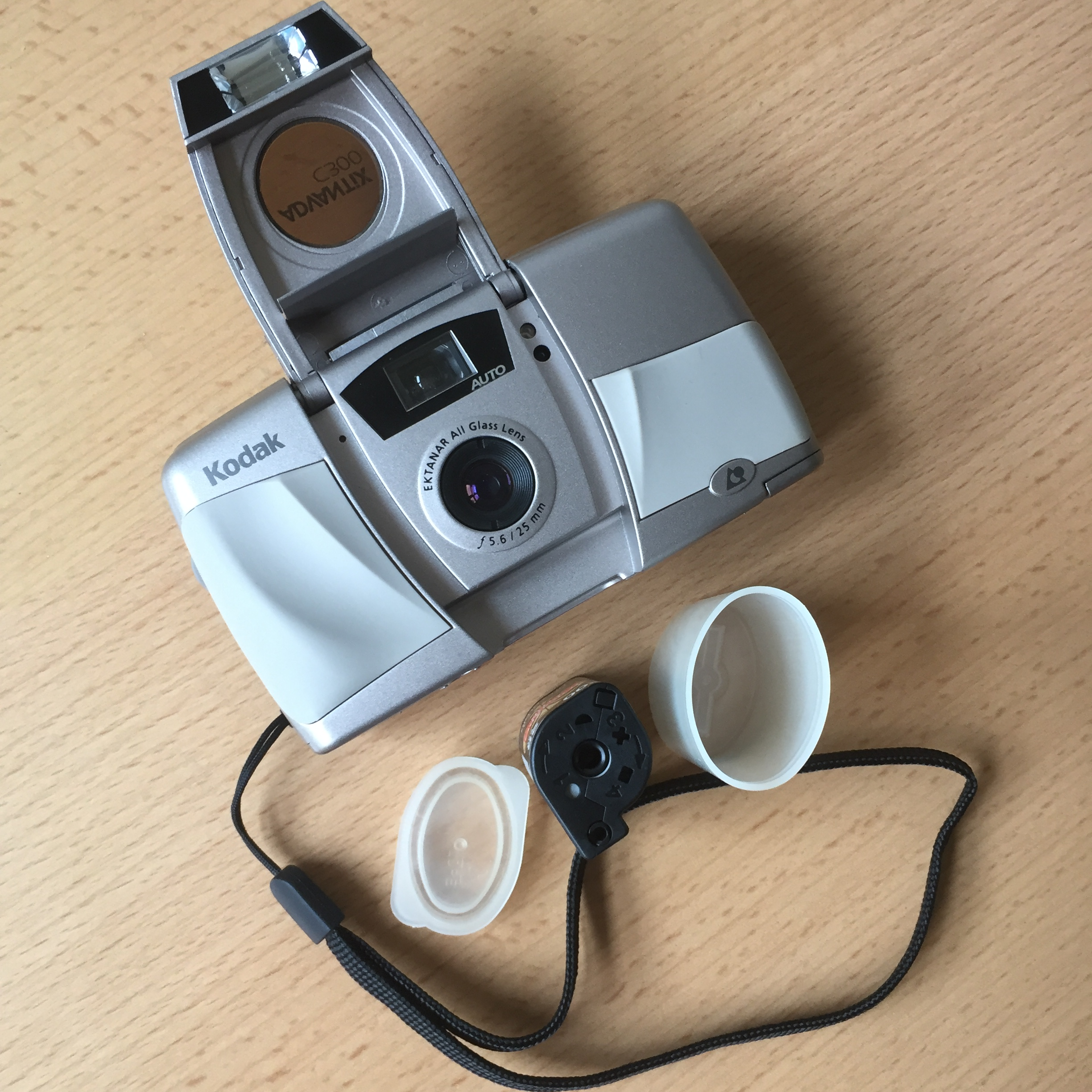 Kodak Advantix C300 APS-Kamera